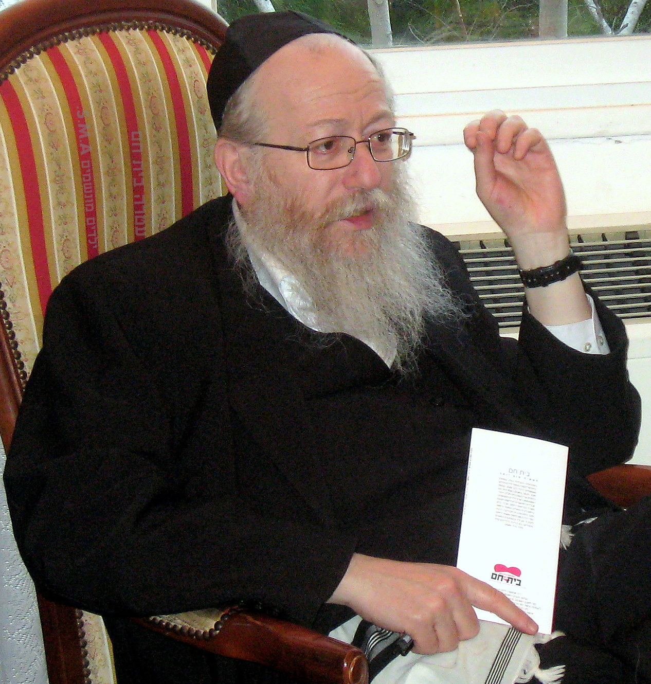 יעקב ליצמן, צולם במסגרת ביקור של סגן שר הבריאות יעקב ליצמן בעמותת "בית חם" המרכז לילדים מונשמים ילדי ה S.M.A. בחיפה .